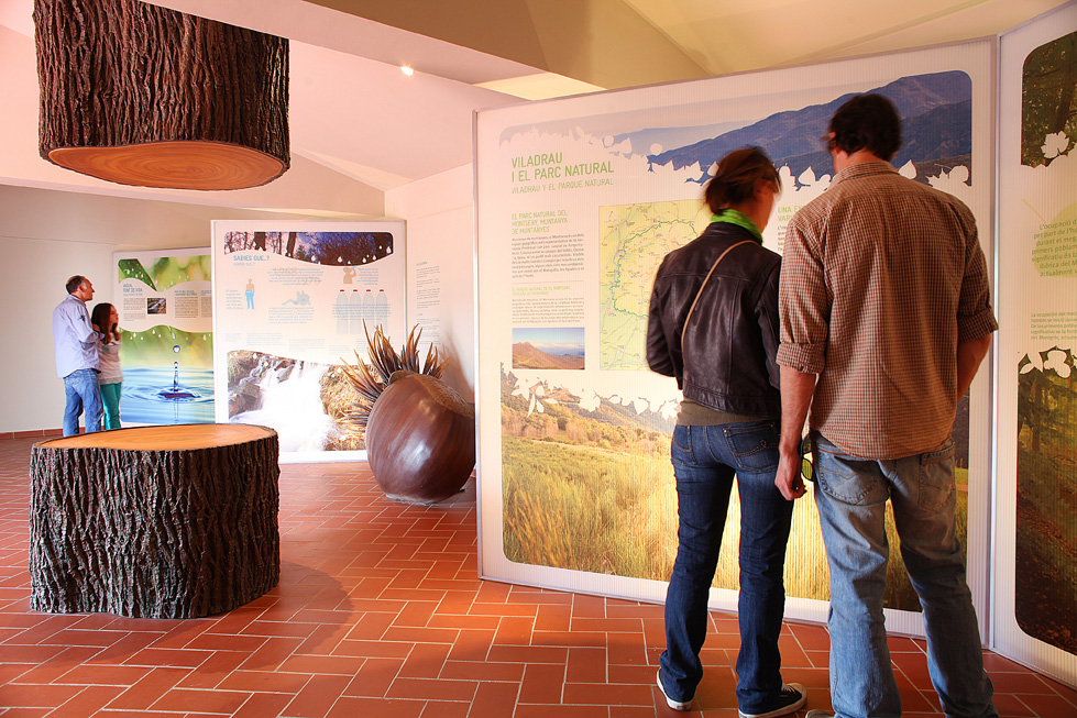 Exposició del Parc Natural del Montseny